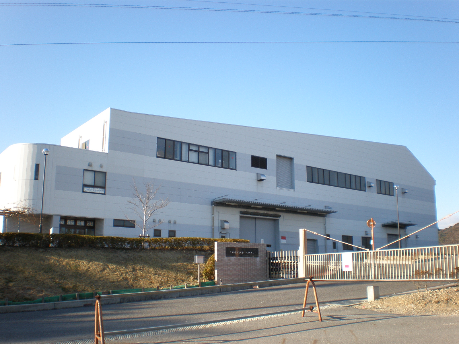 愛知県小牧市にあるリサイクル関連施設リサイクルハウス